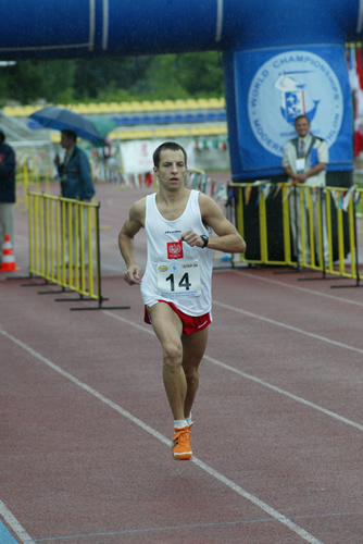 Przemysław Gałecki, aktualny Mistrz Polski w Pięcioboju Nowoczesnym